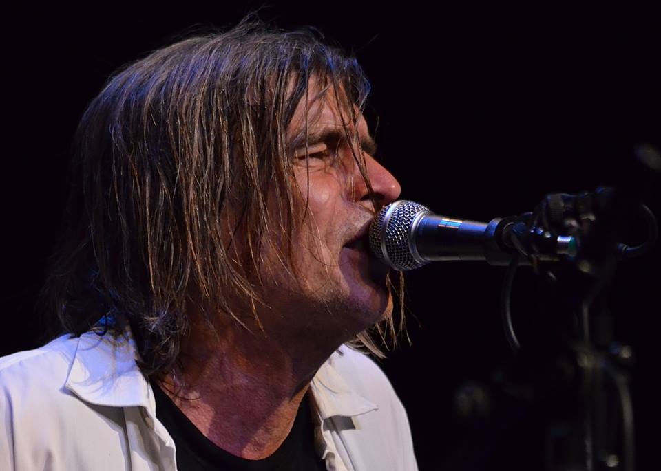 Révész Sándor egy koncerten. Cegléd.